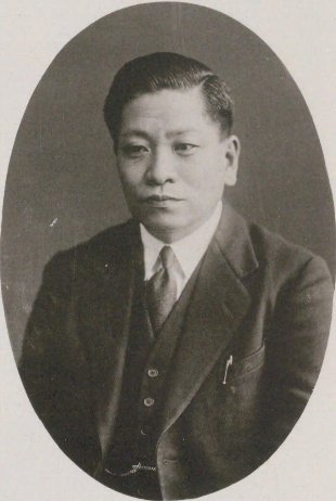 熊野英（1889-1963）